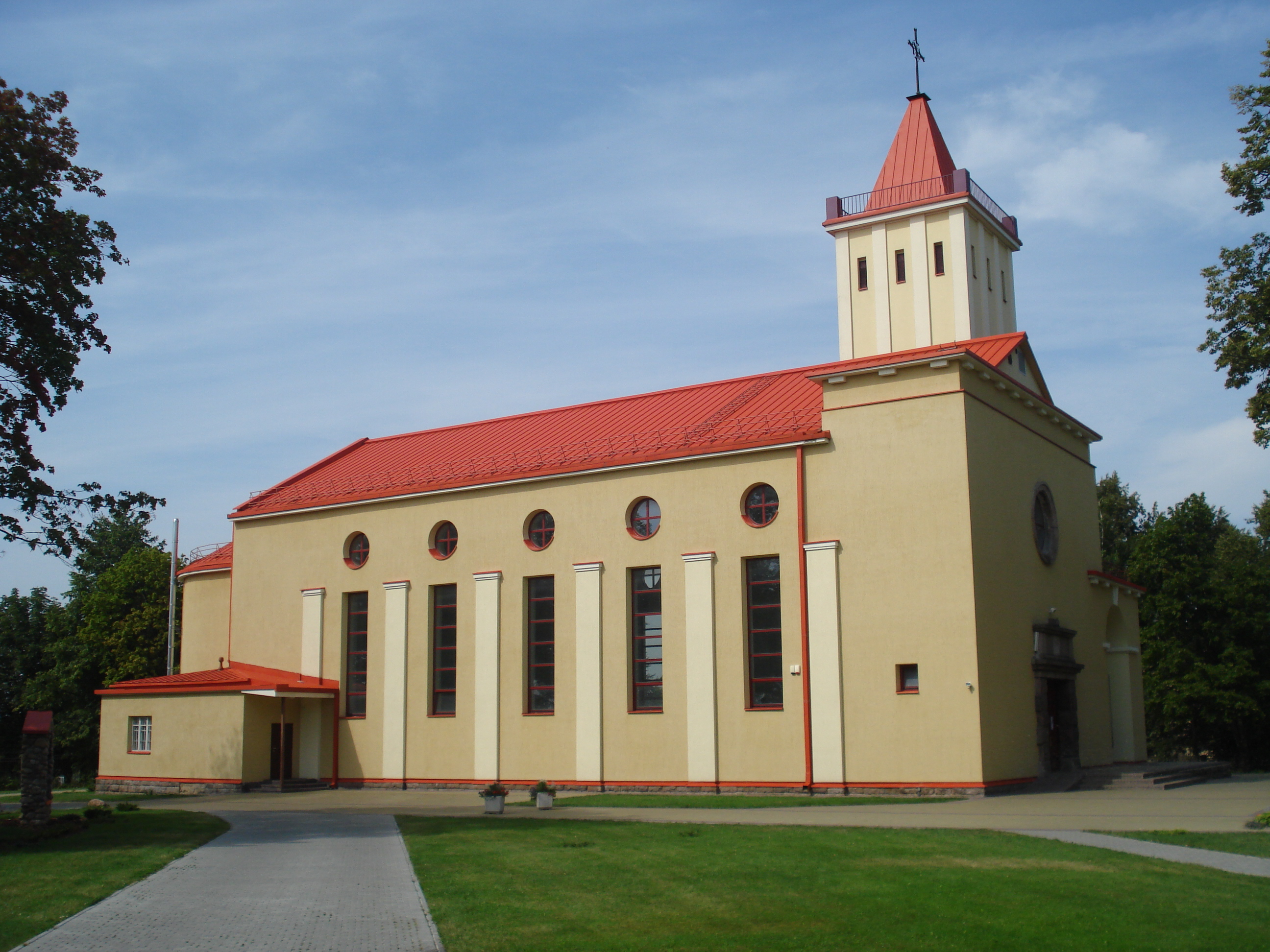 Church of Our Lady Queen of Peace (Vilniaus Švč. M. Marijos, Taikos Karalienės bažnyčia) in Naujoji Vilnia (Parko g. 15)